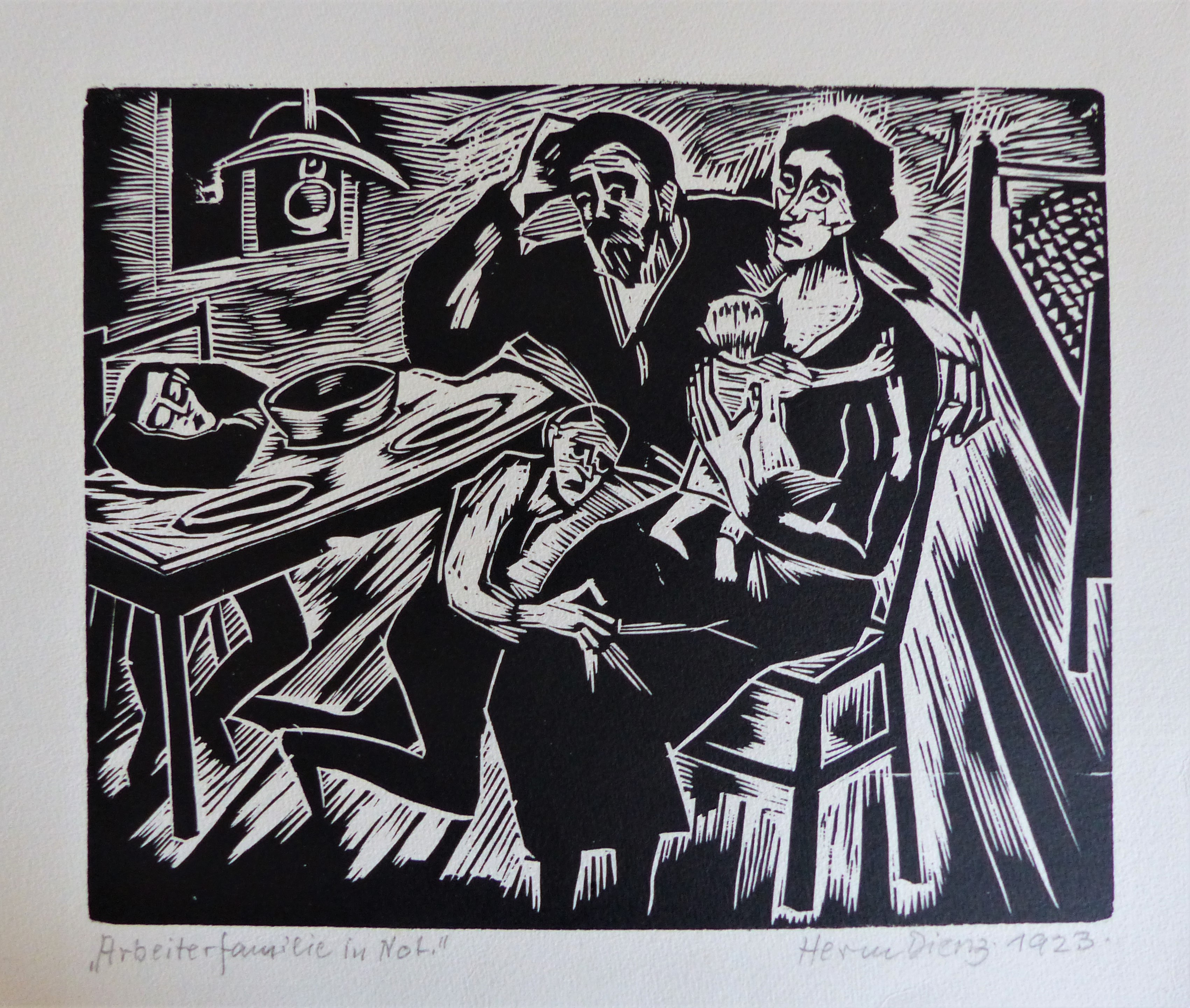 Holzschnitt "Arbeiterfamilie in Not", 1923, Foto von [Mathias Tietke]